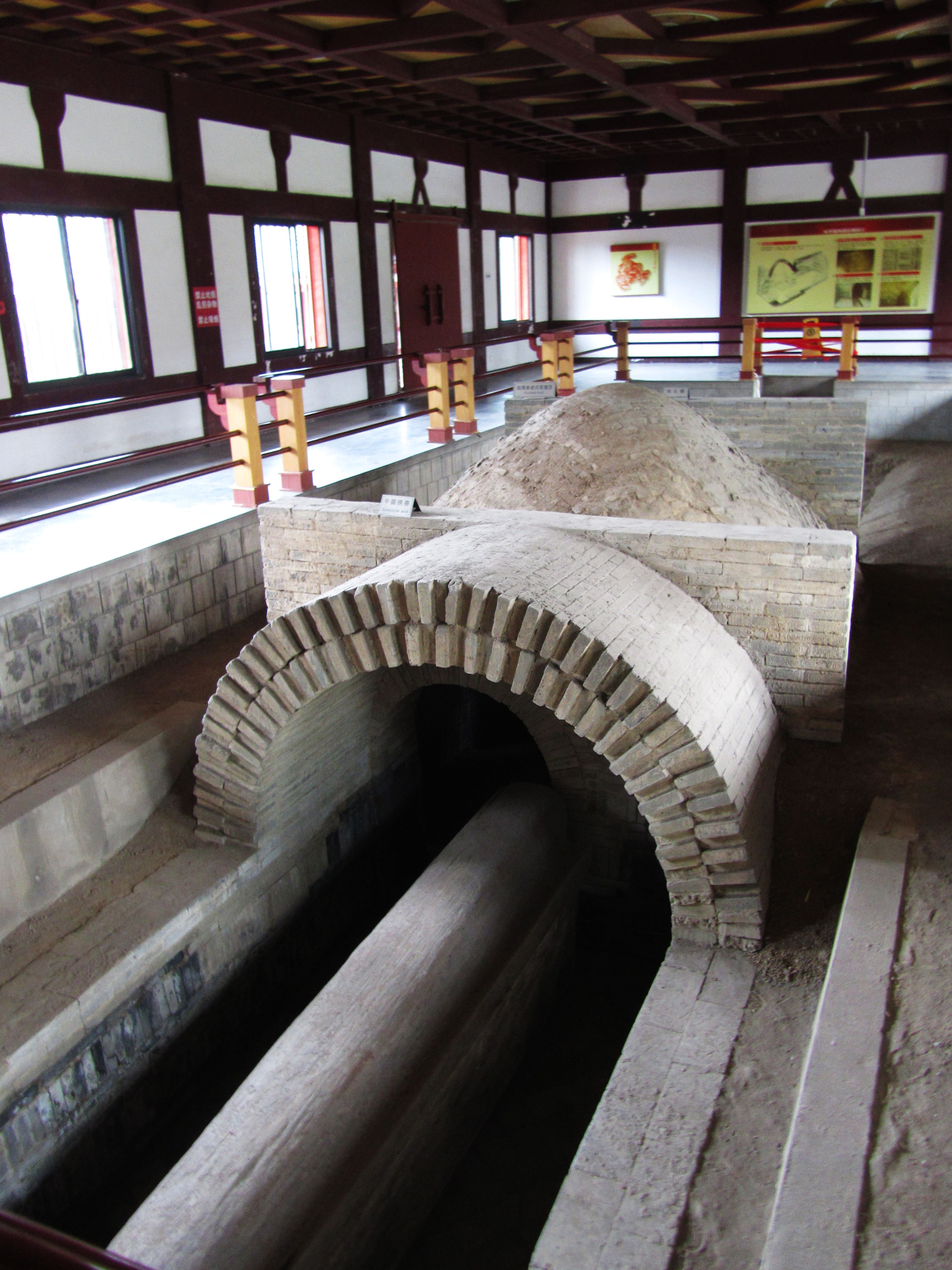 朱然墓自墓室方向看。